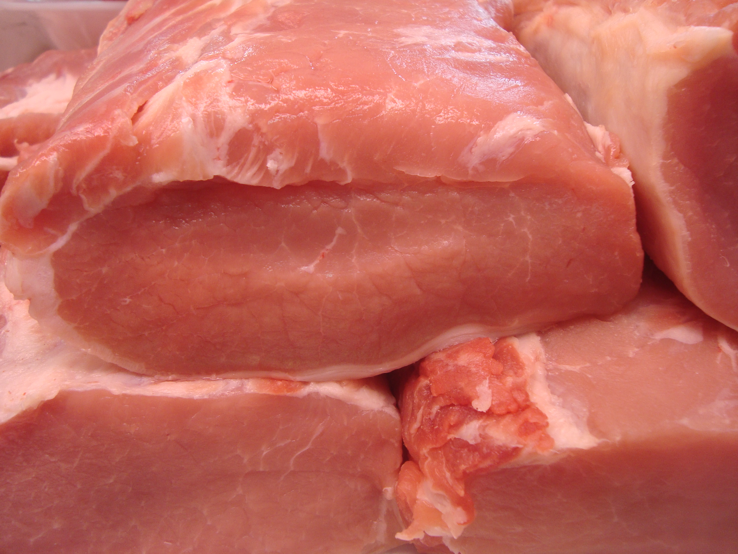 La cinta de llom és una peça de carn molt apreciada del porc, és una carn fina i neta sense infiltracions de greix, se situa com el seu nom indica, al llom de l'animal.